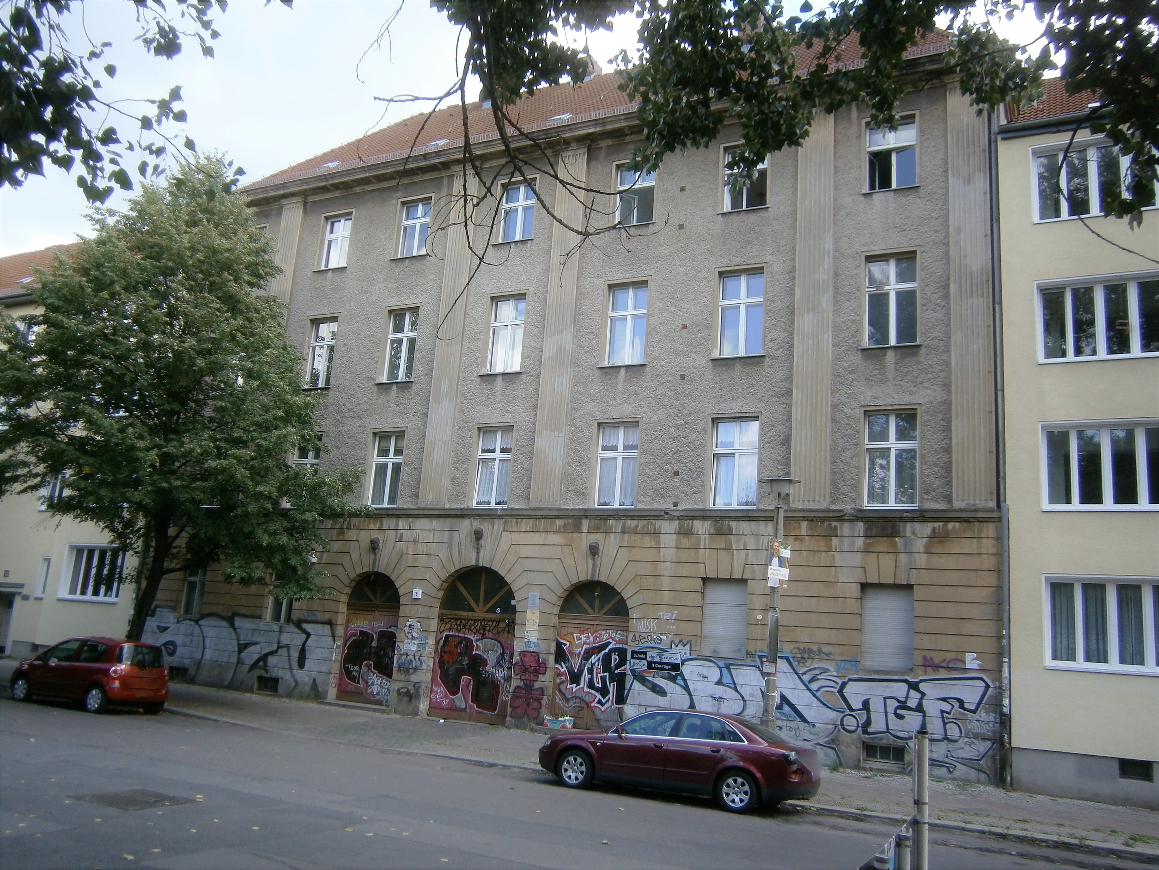 Die Grüne Stadt ist ein 1938/1939 erbautes Wohnensemble und die entsprechende Ortslage im Berliner Ortsteil Prenzlauer Berg des Bezirks Pankow. Im Bild die Straßenfront des Schulgebäudes aus den 1920er Jahren zwischen den später erbauten Wohnhäusern an der Eugen-Schönhaar-Straße